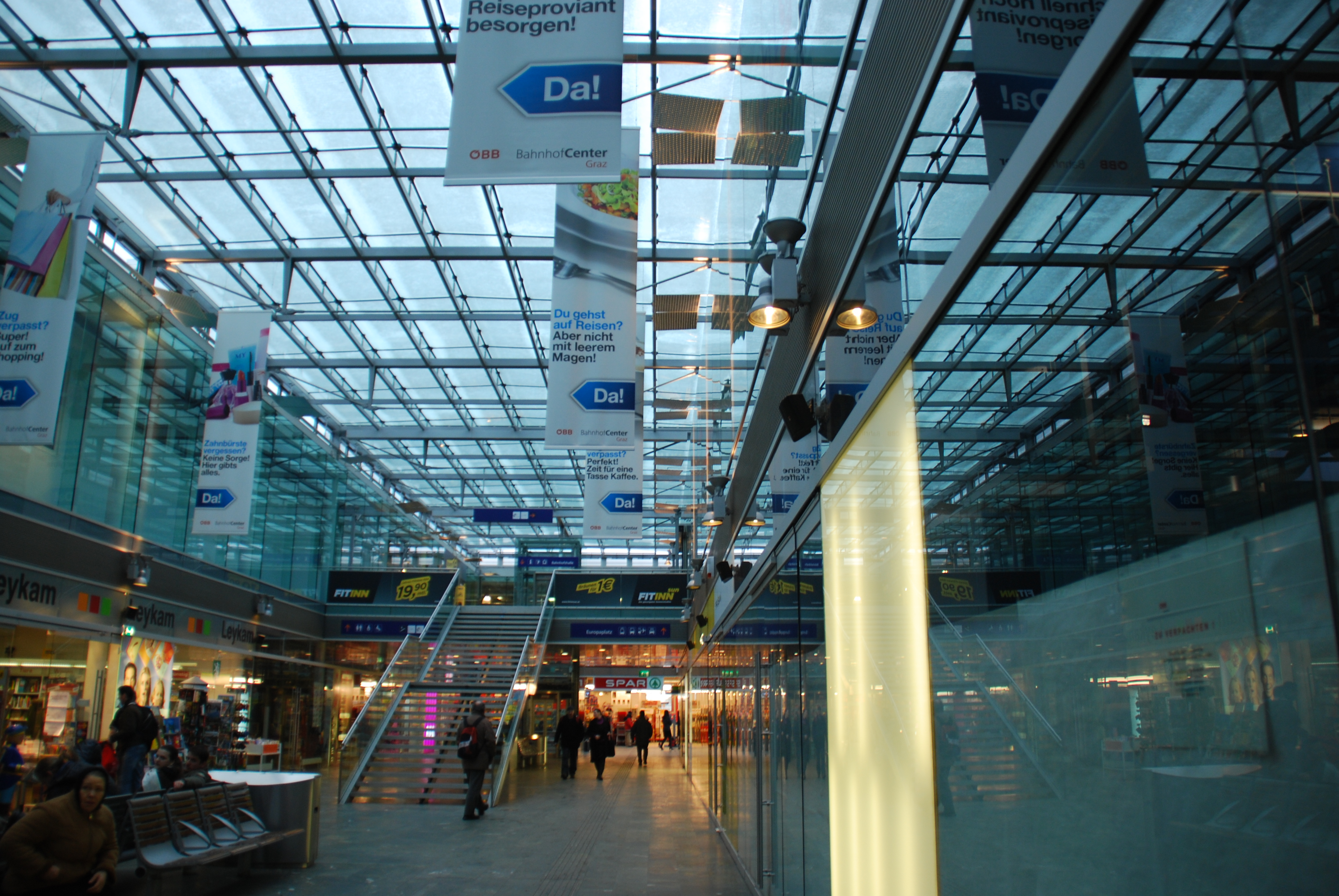 Im Inneren des Bahnhofs